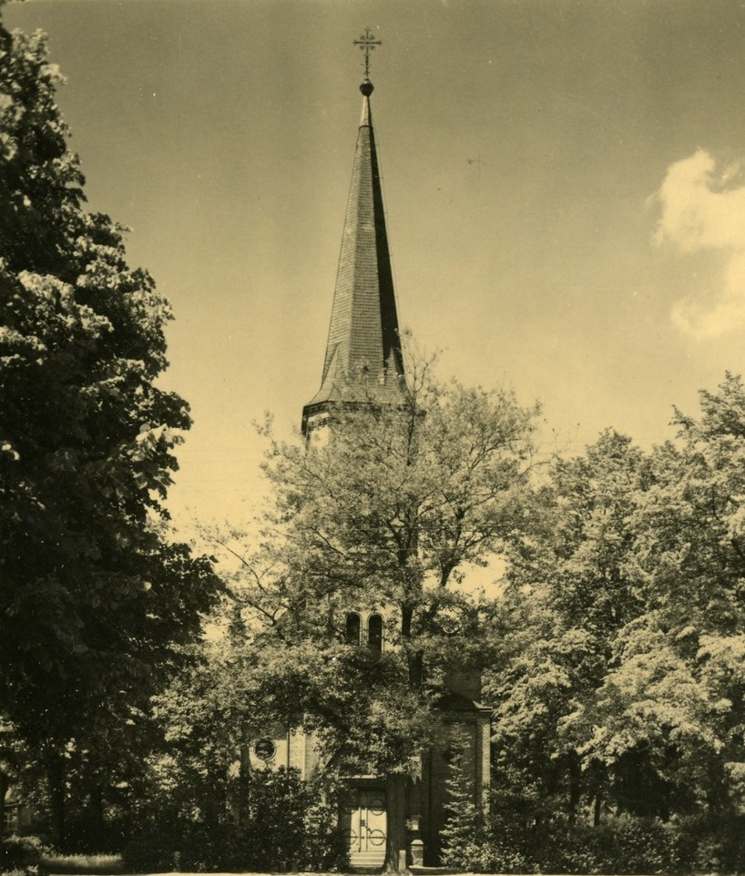 Gröditz; evangelische Kirche This postcard is from publisher Brück & Sohn in Meißen ( postcard has a unique number 28890 and is available in a higher resolution at the publisher. This images was uploaded in a cooperation project between Wikipedians and the publisher.